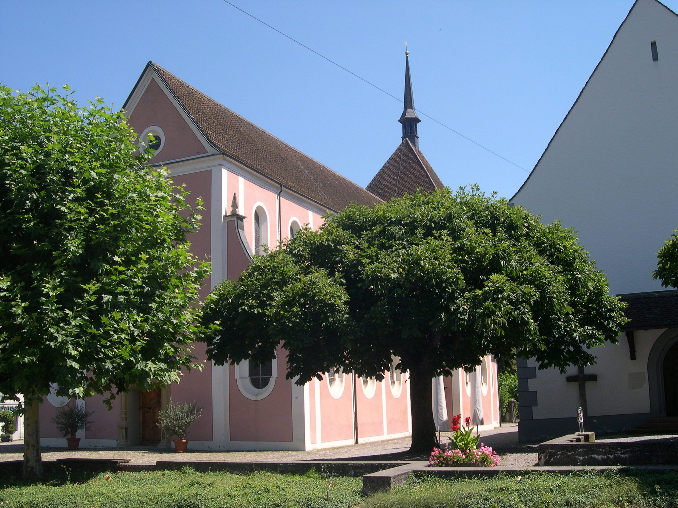 Verenamünster, ehemalige Stiftskirche in Zurzach